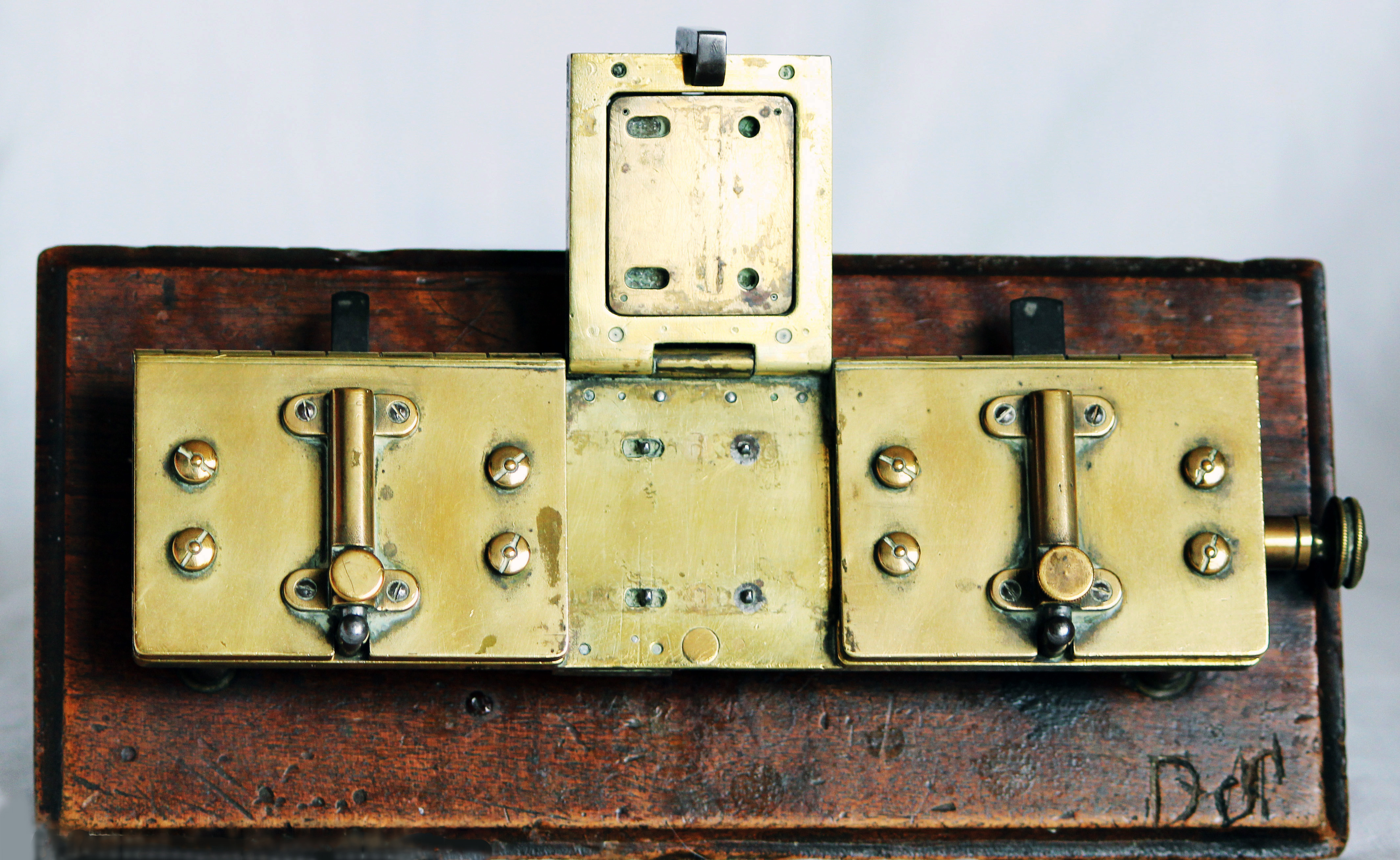 Presse à coller les films 35mm en laiton. Avec rattrapage du retrait (rétrécissement de la pellicule ou très légères différences entre les fabricants) par le bouton à droite qui déplace les ergots de la place à soudure (ouverte au milieu). Au début du XX° siècle.